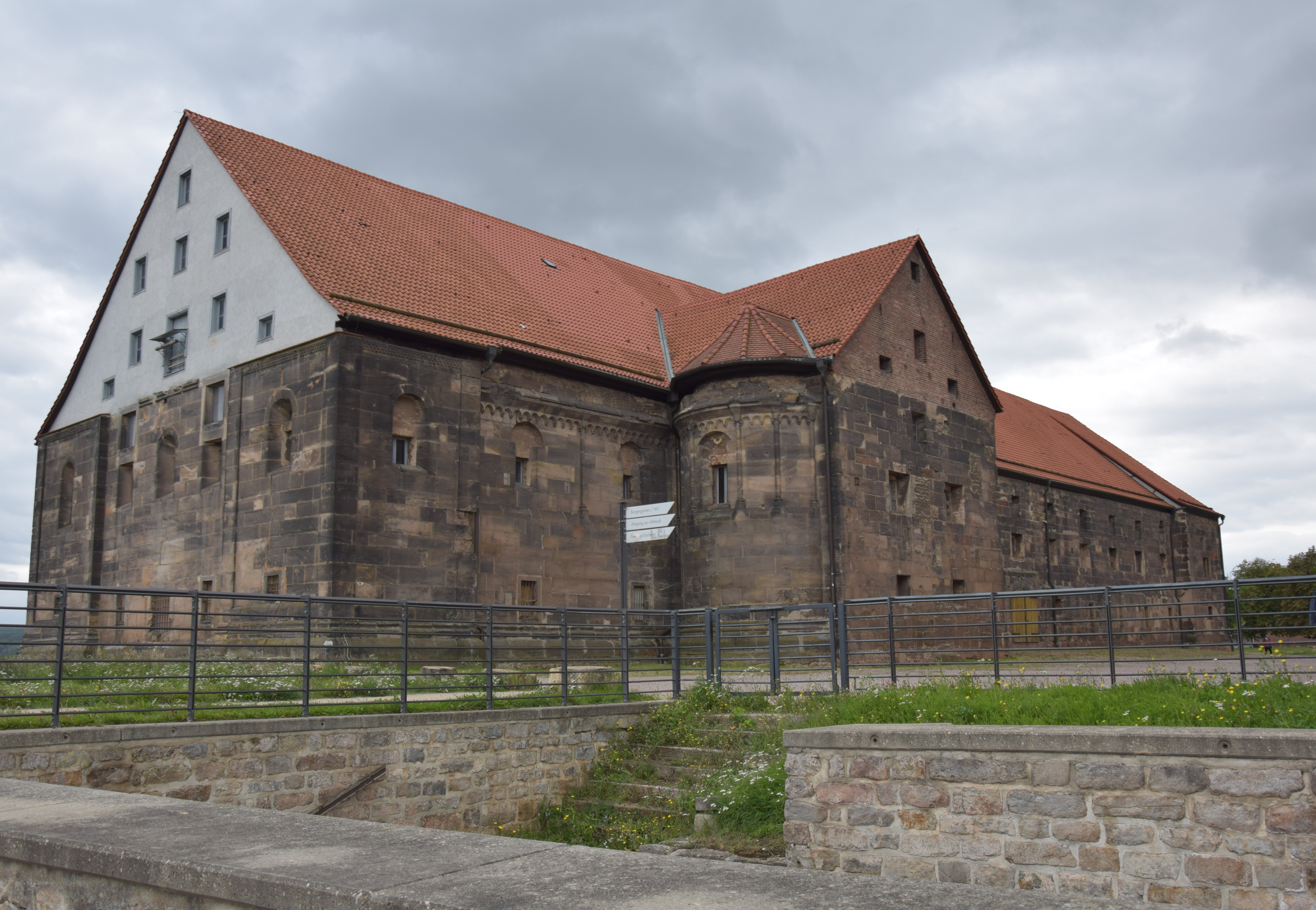 Klosterkirche St. Peter und Paul in Erfurt